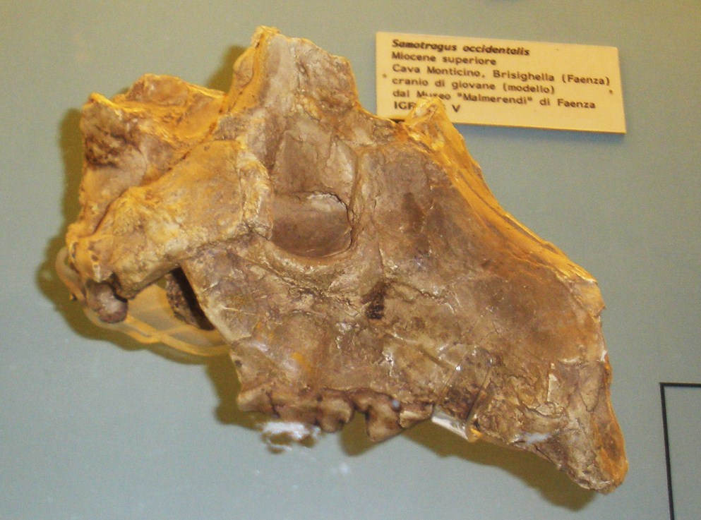 Fossil of Lycyaena, an extinct mammal- Took the picture at Museo di Paleontologia di Firenze